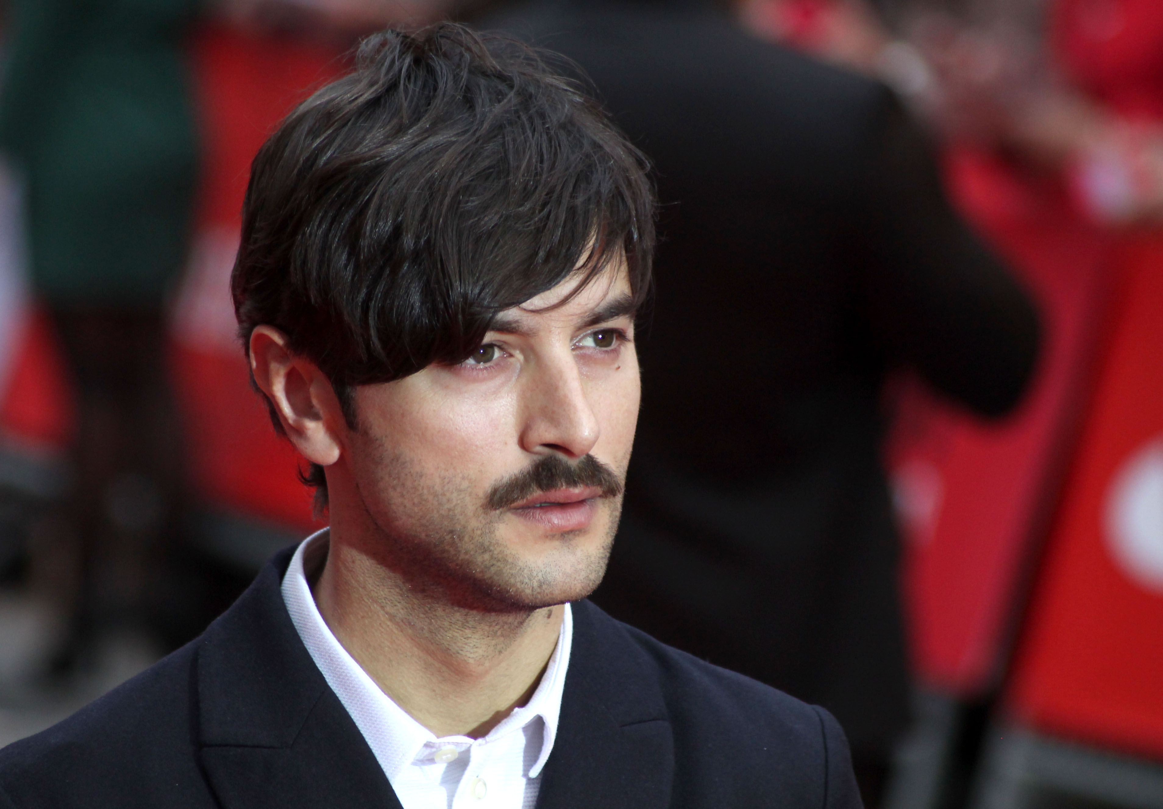 Seminci 2015